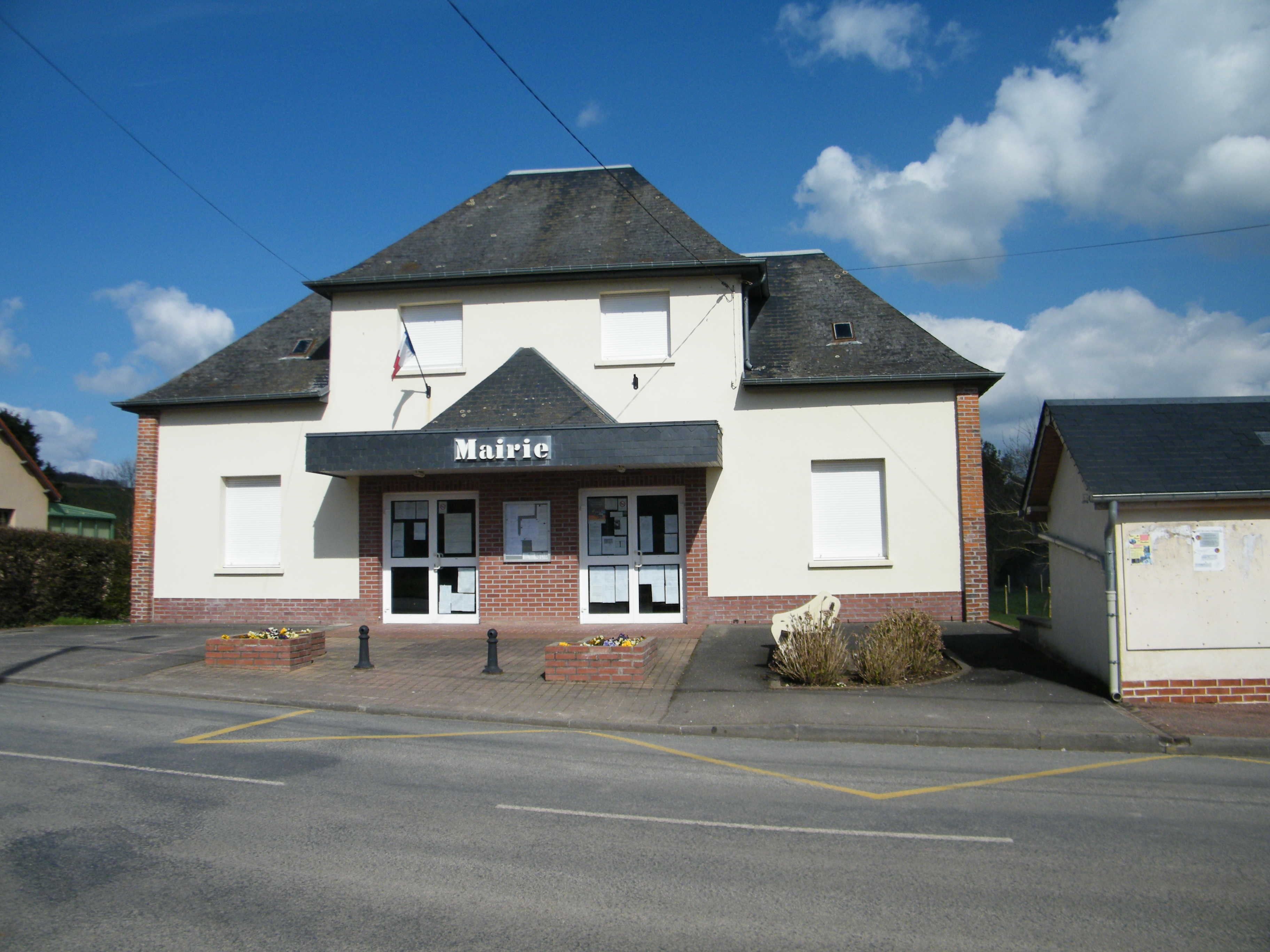 La mairie.